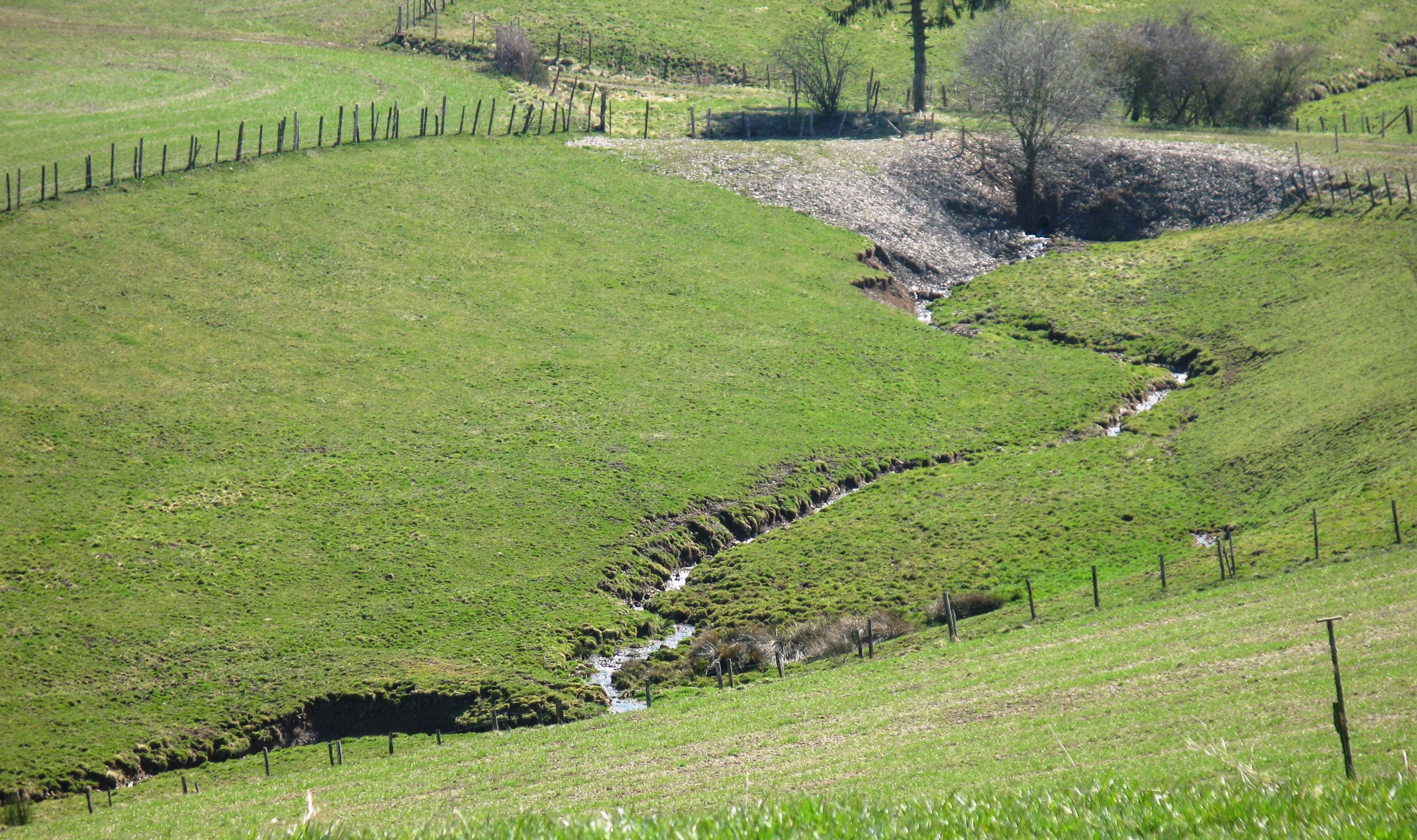 D'Mooschterbaach um Flouer Blobich. Kategorie:Baachen zu Lëtzebuerg